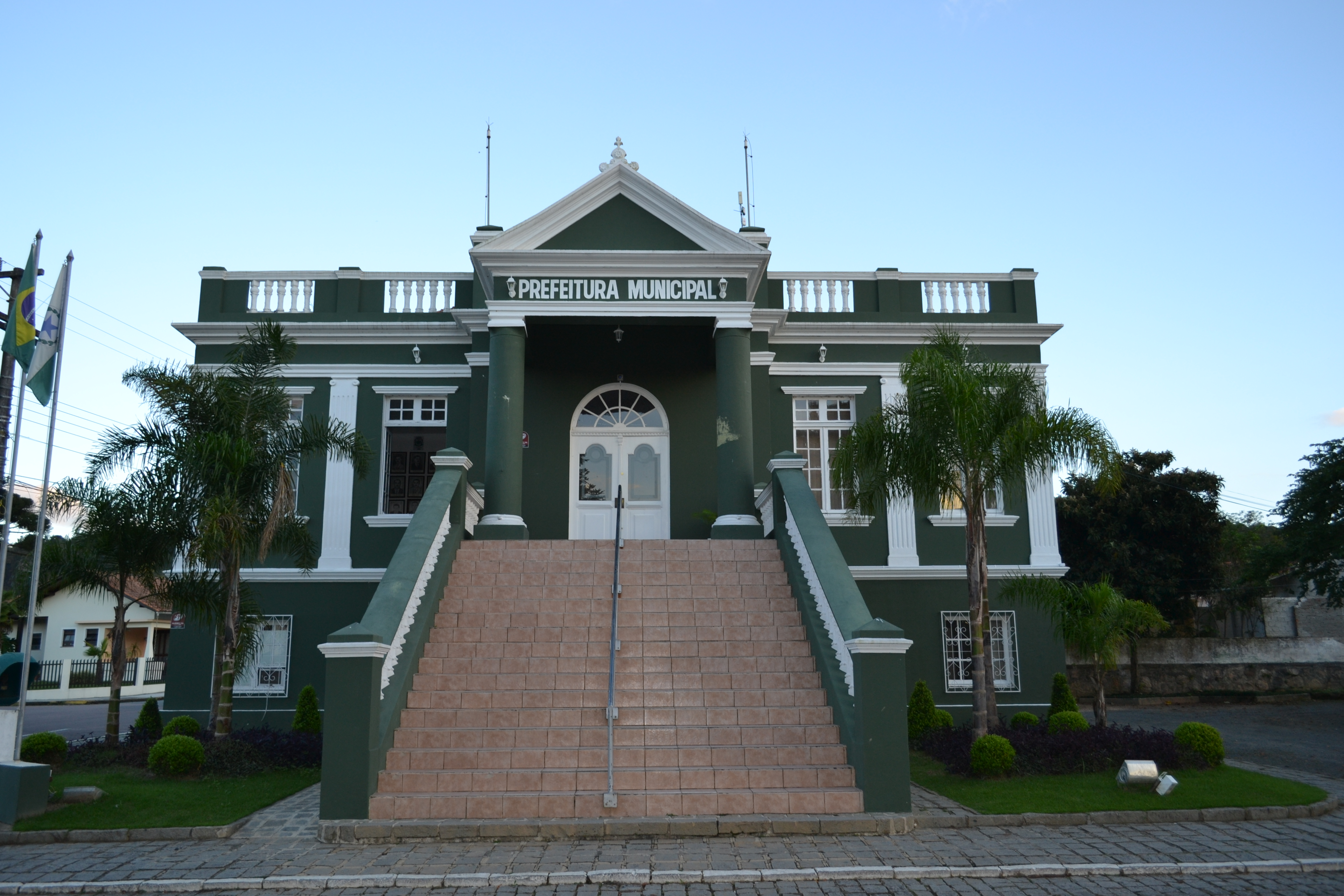 Foto da prefeitura municipal de Campo Alegre, SC, Brasil